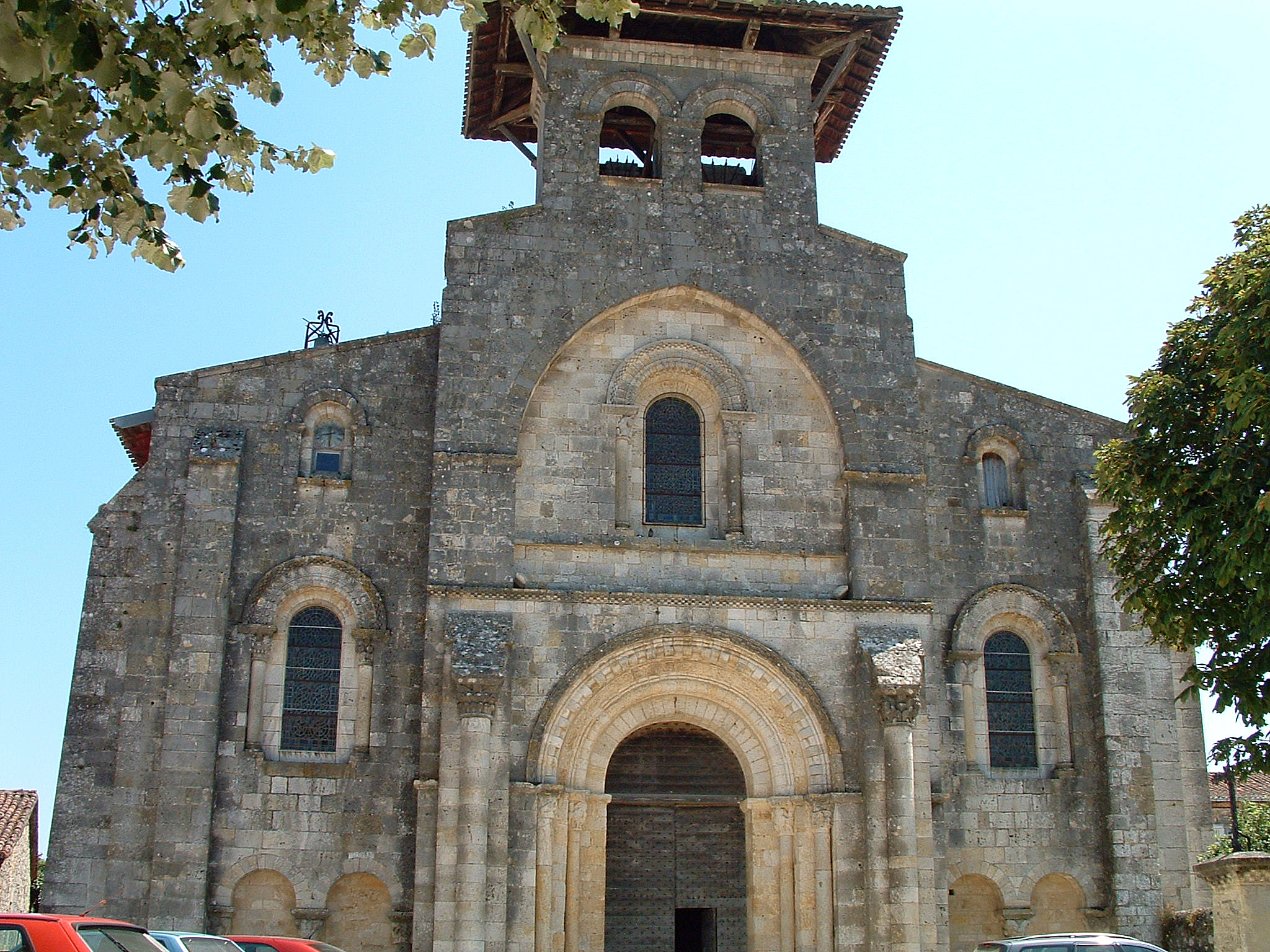 Moirax - Église Notre-Dame - Façade occidentale